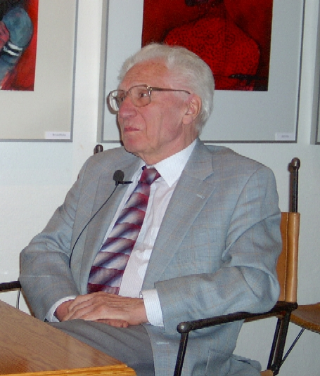 Bildbeschreibung: Der Mediziner und Forscher Moritz Mebel während einer Buchdiskussion im Brecht-Haus in Berlin, Mai 2006 photo taken by User:SpreeTom (own work) date / Datum: 17.05.2006